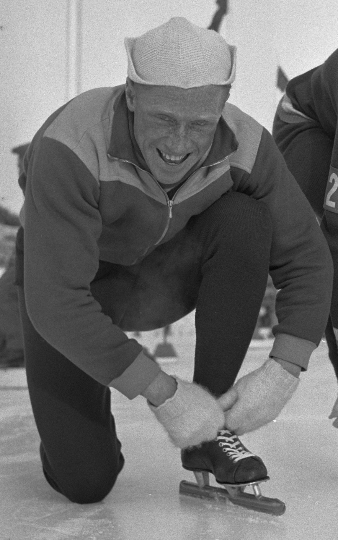 Collectie / Archief : Fotocollectie Anefo Reportage / Serie : [ onbekend ] Beschrijving : Davos Hollandse schaatsploeg. Nico Olsthoorn Datum : 28 januari 1953 Locatie : Davos Trefwoorden : schaatsploegen Persoonsnaam : Maarse, Gerard, Olsthoorn, Nico Fotograaf : Illustrated Press / Opdracht Anefo Auteursrechthebbende : Nationaal Archief Materiaalsoort : Negatief (zwart/wit) Nummer archiefinventaris : bekijk toegang 2.24.01.03 Bestanddeelnummer : 905-5056